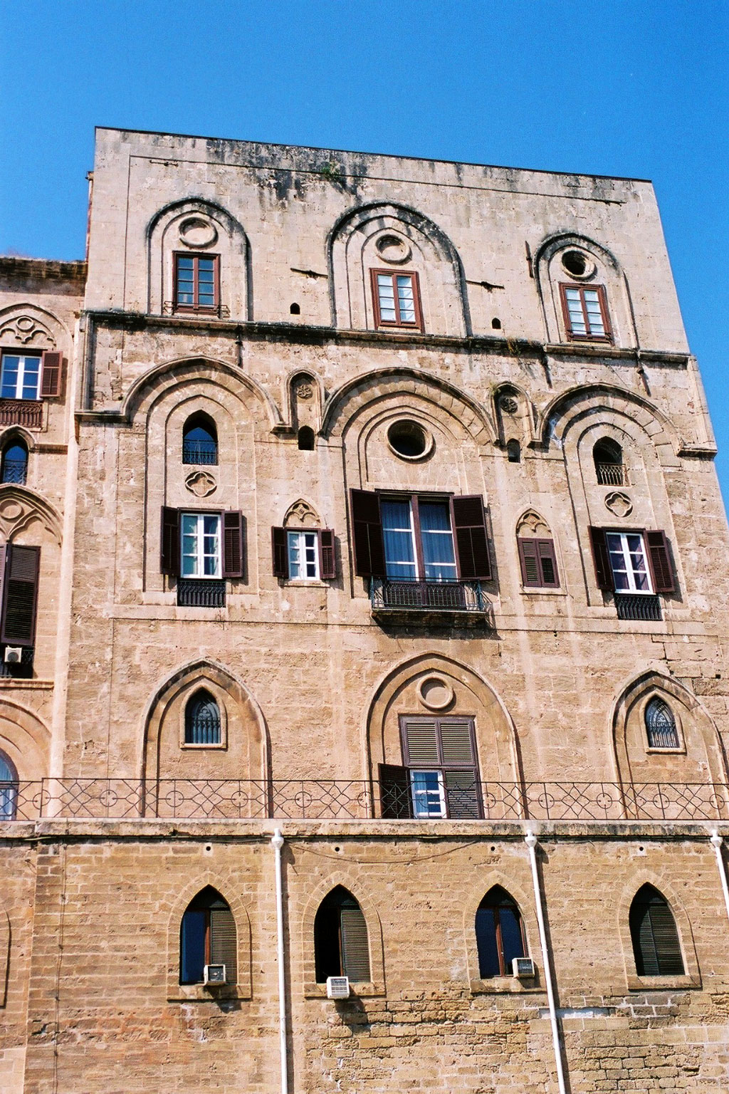 Torre Pisana, Palazzo dei Normanni in Palermo. Norman wing.